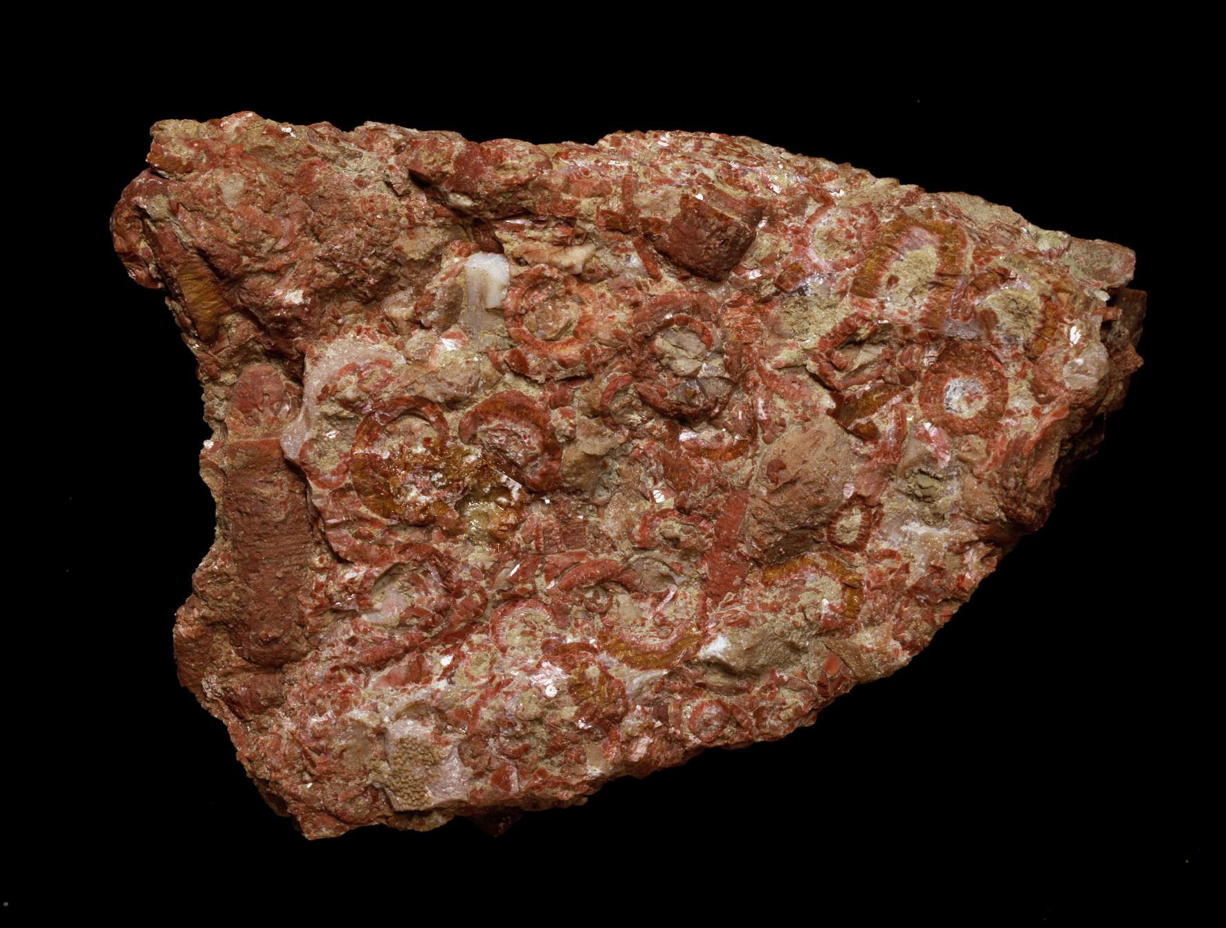 Photo: Anders Damberg Gotlands landskapssten, hoburgskalkstenen, är mer än 400 miljoner år gammal. Den bildades under silur, i havet på lite djupare vatten, vid kanten av dåtida kalkrev. Kalkstenen byggdes huvudsakligen upp av sjöliljor, så kallade krinoidéer, och bergarten kallas därför krinoidékalksten. Den innehåller också mängder av koraller, sjöliljor, mossdjur, musslor, armfotingar och trilobiter. Kalksten är ofta porös men vid Hoburgen är den så tät att den likt marmor kan poleras och användas till fönsterbänkar och bordsskivor. Därför kallas den ibland för Hoburgsmarmor, trots att den inte är någon marmor. En sådan är omkristalliserad och alla fossil har försvunnit men Hoburgens kalksten är full av spår från svunna tider.